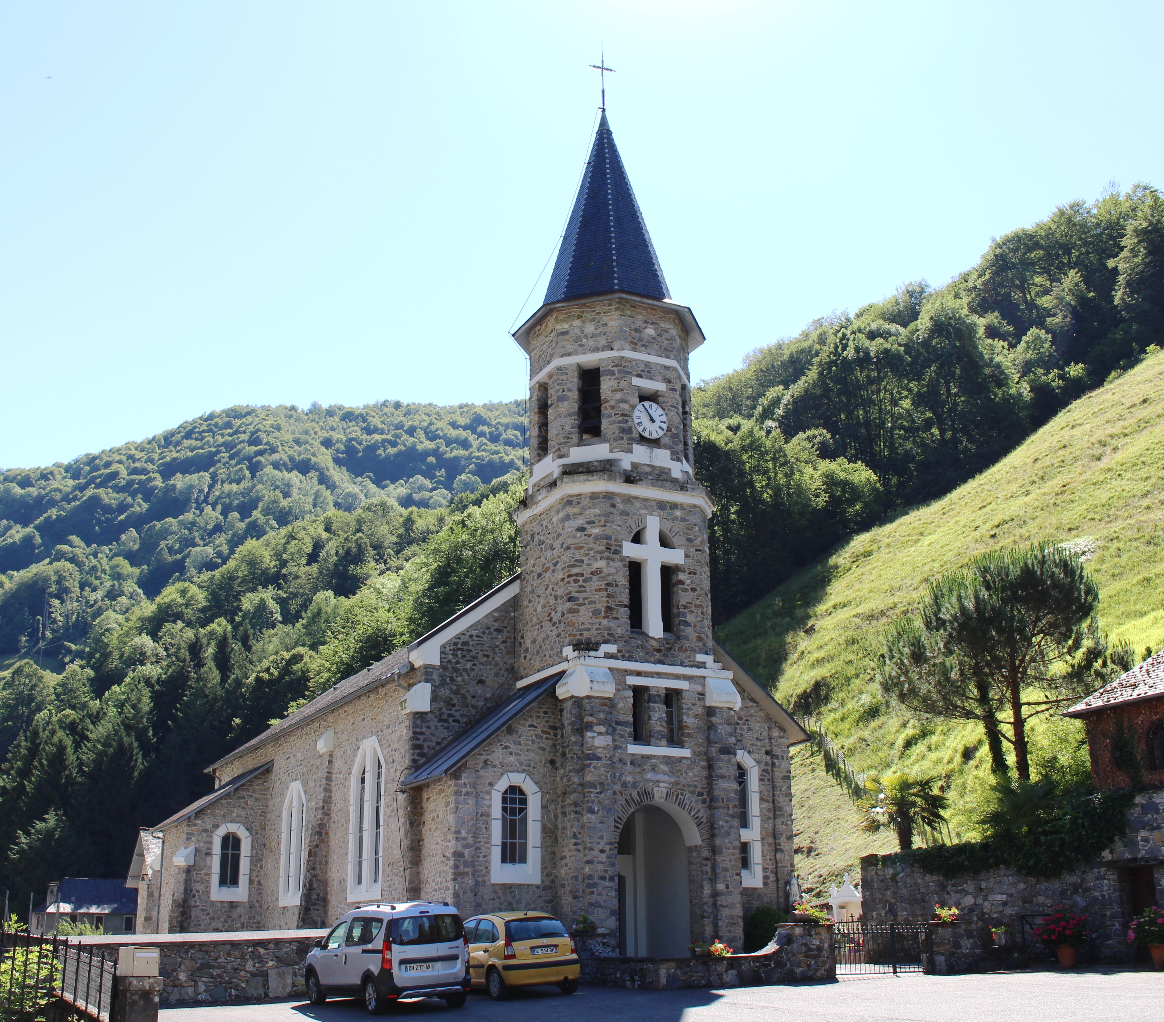 Église Saint-Pierre-et-Saint-Paul de Ferrières (Hautes-Pyrénées)